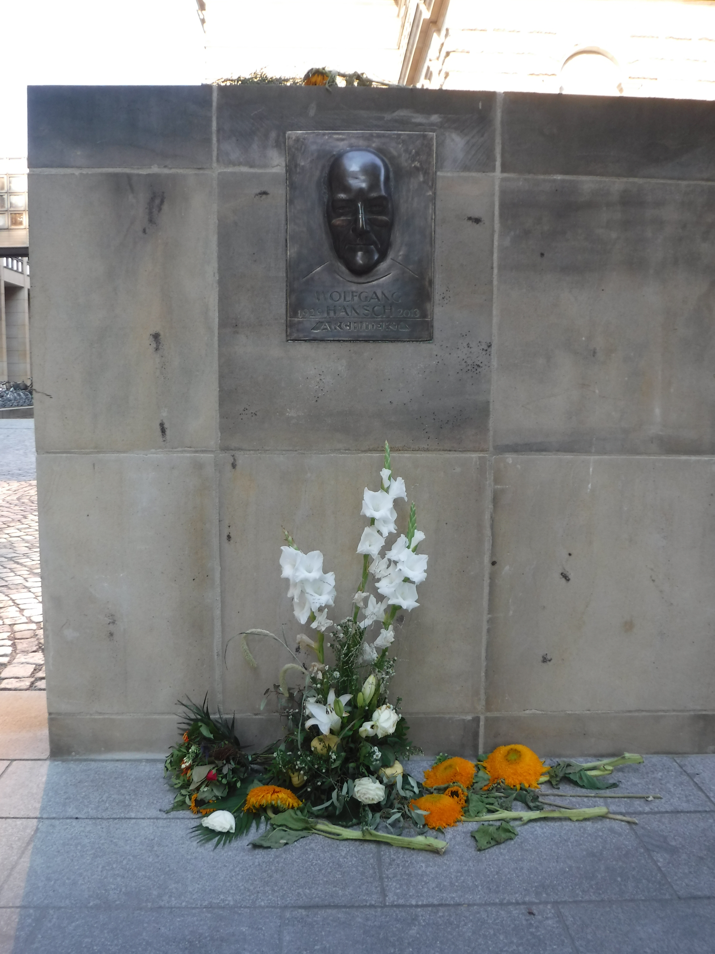 Bronzerelief zu Ehren von Wolfgang Hänsch hinter der Dresdener Semperoper. Auf Initiative der Initiative der Architektenkammer Sachsen erstellt und enthüllt am fünften Todestag Hänschs am 16. September 2018. Bildhauer des Reliefs ist Peter Makolies, die Gesamtkosten betrugn ca. 7000 Euro und wurden teilweise durch Spenden aufgebracht.